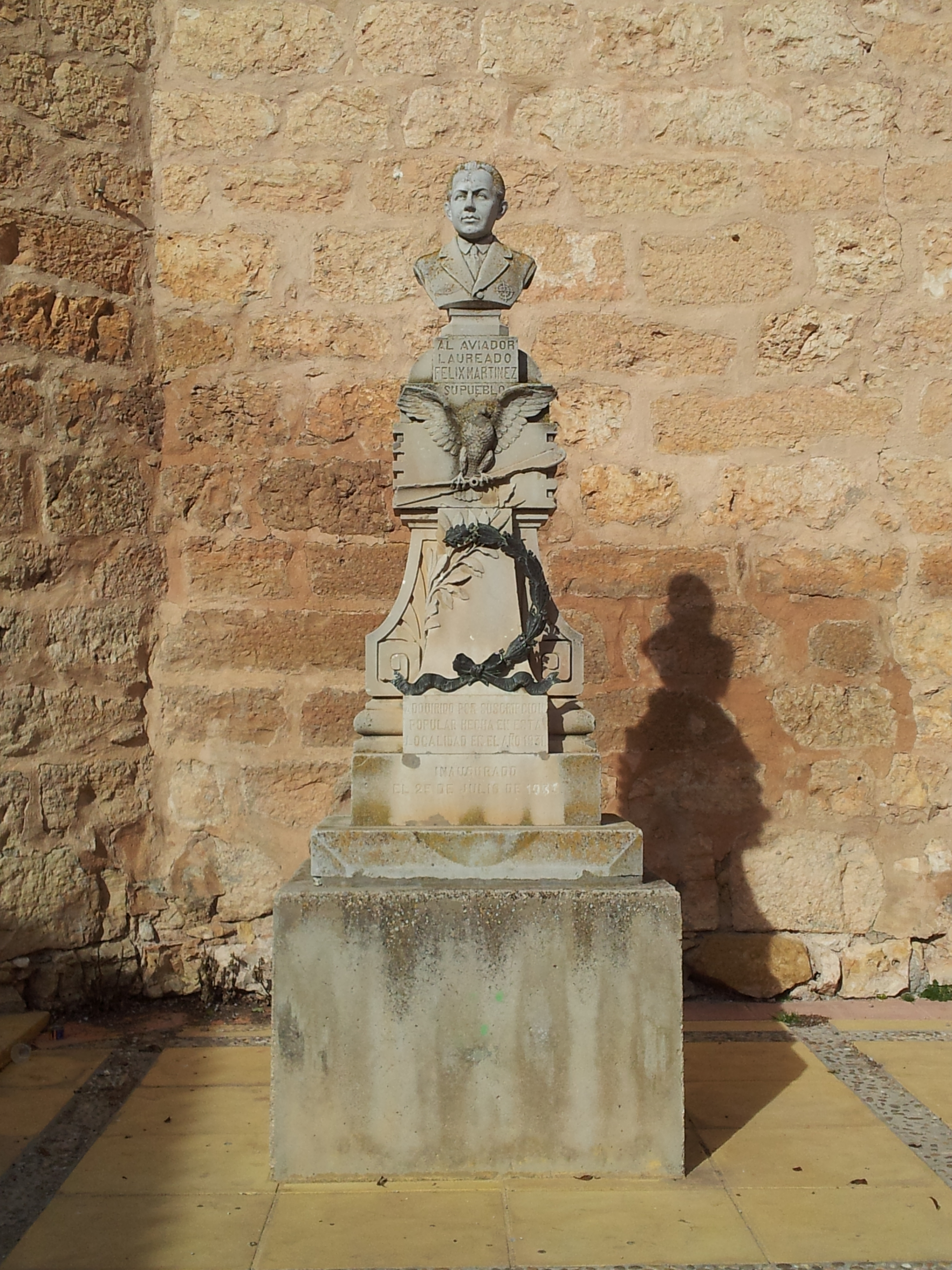 Este es la estatua que el pueblo le dedicó a este pedroñero, Félix Martínez